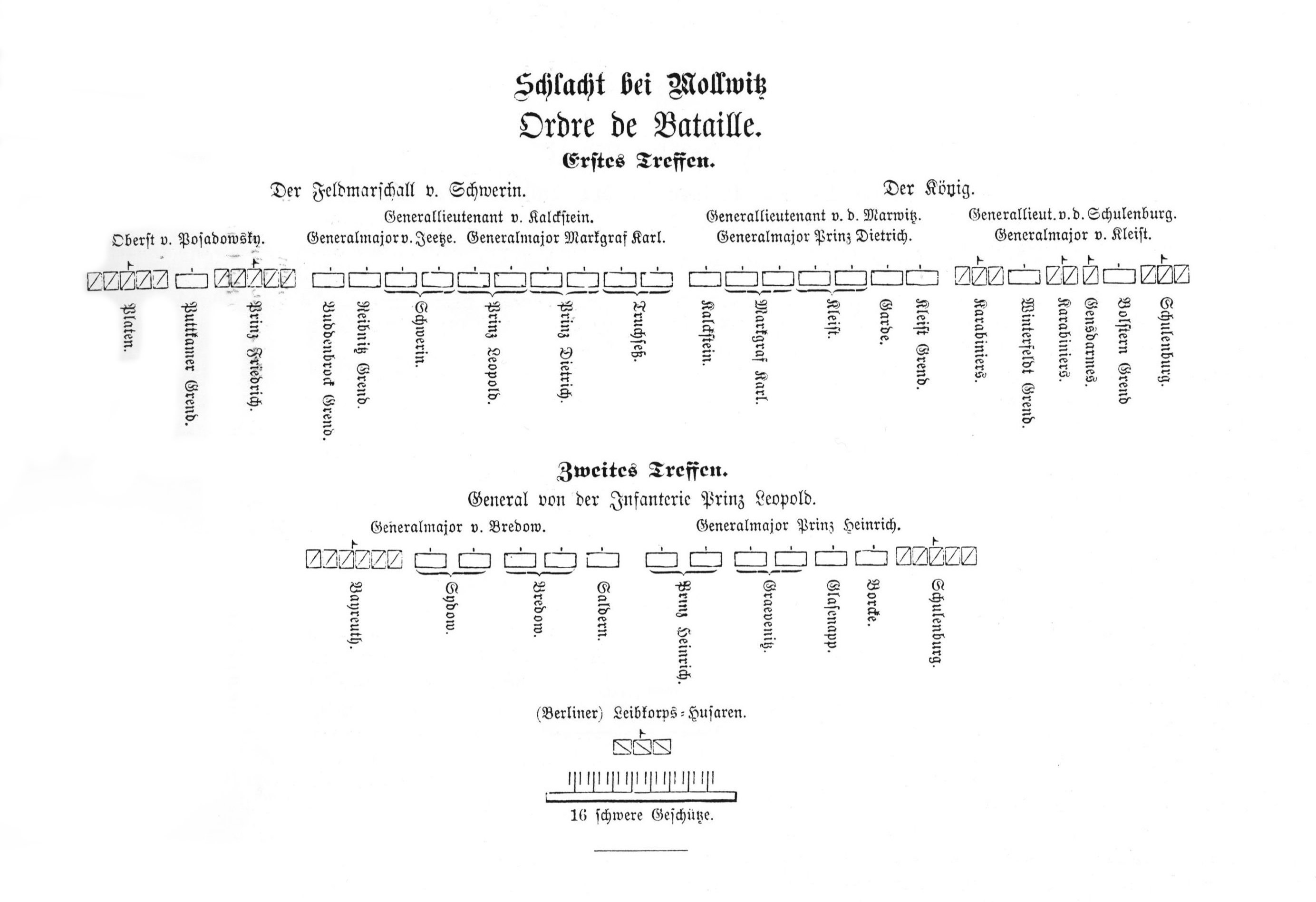 Schlacht bei Mollwitz, Ordre de Bataille, Preußen